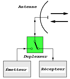 Schéma d'un circuit électronique montrant la position du duplexeur qui fait le lien entre l'antenne et les modules d'émission et de réception. Il partage le temps d'utilisation de ces deux derniers en commutant entre les deux.